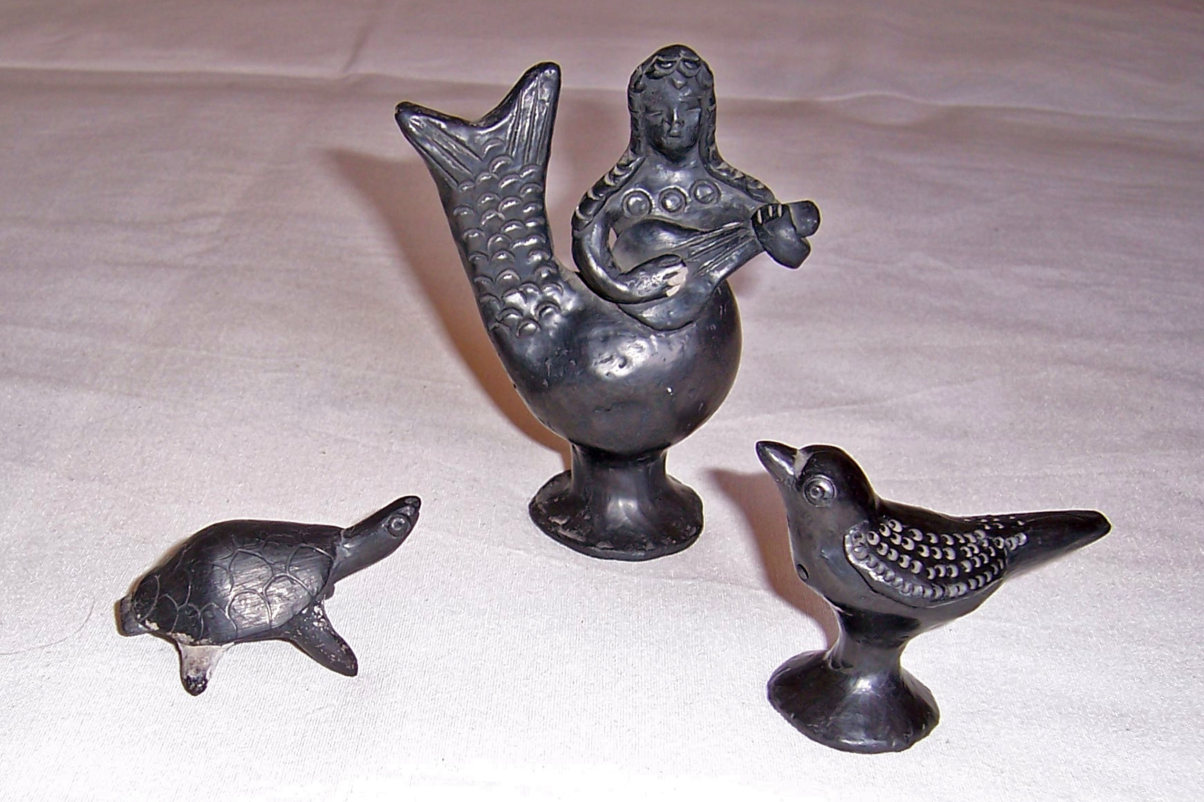 Pitos de barro negro representando una tortuga, una sirena y un pajarito; traza y material tradicionales en Oaxaca (México). No es una pieza única ni catalogada sino que corresponde a la cerámica popular. Adquirido en un tiangui de la ciudad de Oaxaca en 1976.